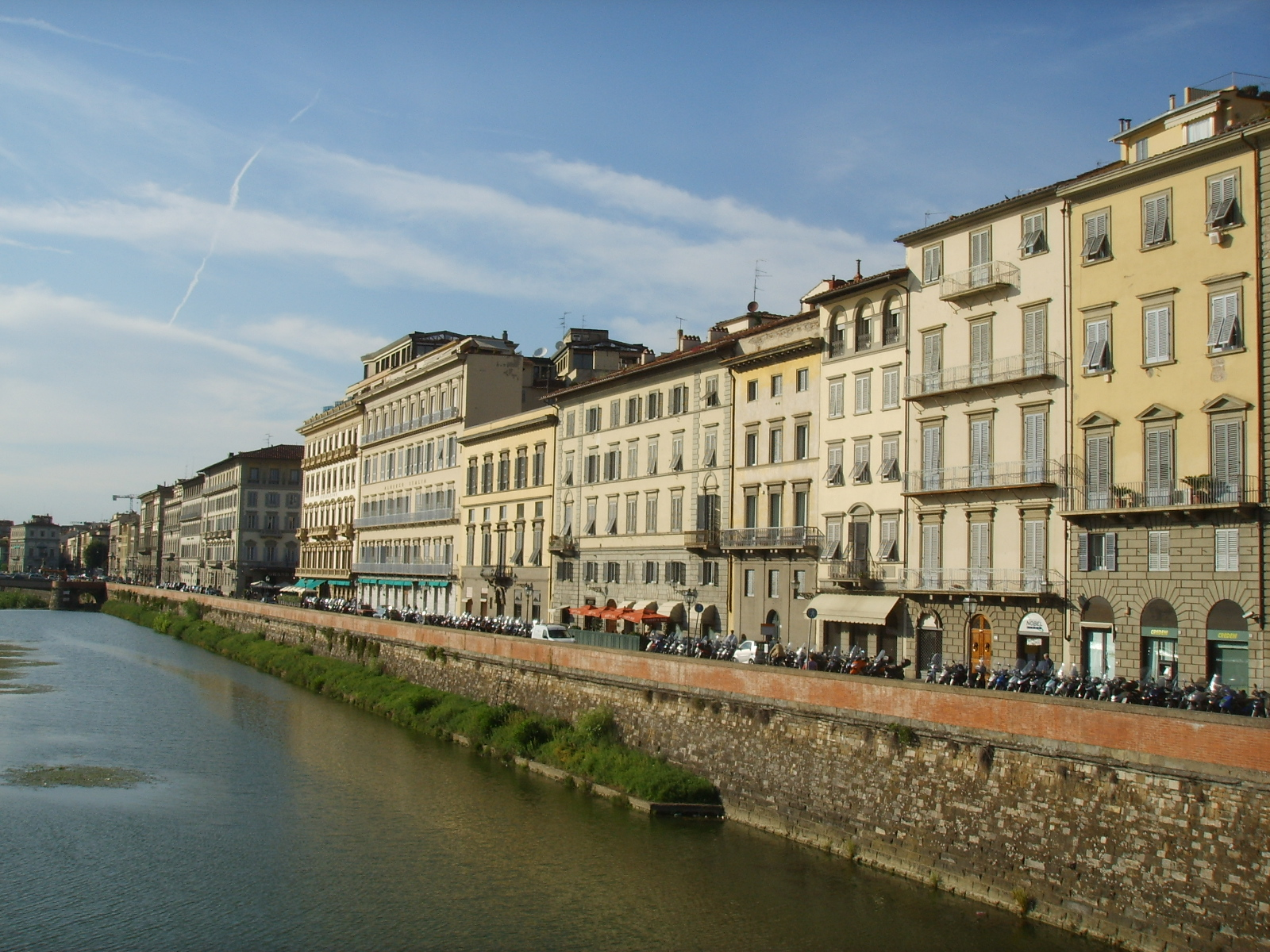 Lungarno Vespucci a Firenze.